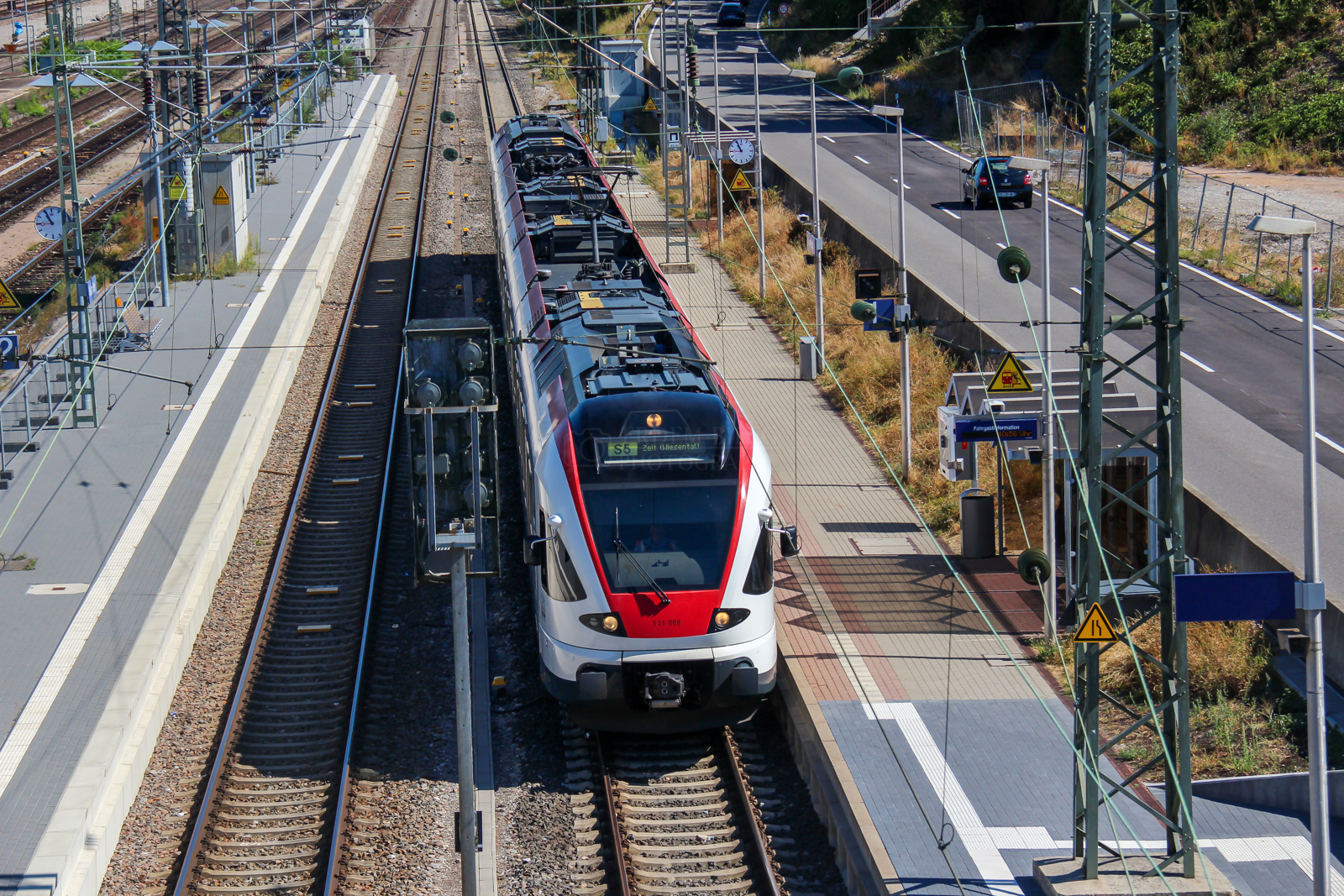 Die S5 als Regio S-Bahn Basel in Weil am Rhein abfahrbereit nach Zell (Wiesental), Zell wird nur sonntags mit der S5 bedient.